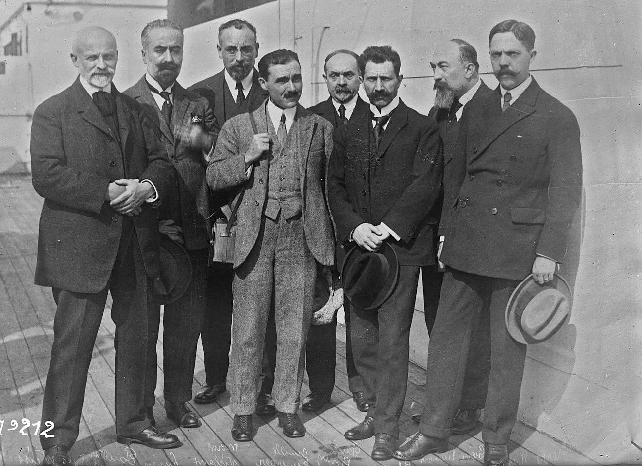 Titre : [De d. à g.] Pierre Masson, Pierre Dumont, Léon Blum, Paul [i.e. Pol] Bouin, Camille Duverger, Moriss [i.e. Maurice] Nicloux, Lucien[-Marie] Pautrier et Georges Weiss, mission d'étude aux États-Unis [concernant la fabrication de manière semi-industrielle de l'insuline d'origine extractive], cliché Keystone : [photographie de presse] / [Agence Rol] Auteur : Agence Rol. Agence photographique Date d'édition : 1922 Sujet : Duverger, Camille (18..-1965) -- Portraits Sujet : Weiss, Georges (1859-1931) -- Portraits Sujet : Bouin, Pol (1870-1962) -- Portraits Sujet : Nicloux, Maurice (1873-1945) -- Portraits Sujet : Pautrier, Lucien Marie (1876-1959) -- Portraits Sujet : Blum, Léon (1872-1950) -- Portraits Sujet : États-Unis Type : Portraits collectifs -- 1914-1945,image fixe,photographie Langue : Français Format : 1 photogr. nég. sur verre ; 13 x 18 cm (sup.) Format : image/jpeg Droits : domaine public Identifiant : ark:/12148/btv1b530946371 Source : Bibliothèque nationale de France, département Estampes et photographie, EI-13 (951) Relation : Description : Référence bibliographique : Rol, 79212 Description : Appartient à l’ensemble documentaire : Pho20Rol Provenance : bnf.fr Date de mise en ligne : 23/03/2015